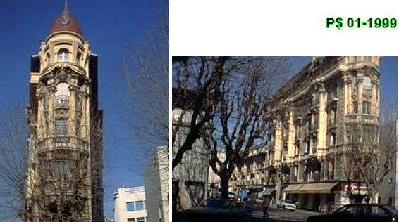 Palais Cauvin - Rue de Lepante , quartier Carabacel Le palais Cauvin est situé au début sud de la rue de Lepante. On distingue deux batiments dont le plus impressionnant est construit en angle. Les photos sont petites en raison des limitation technologiques des premiers appareils numériques.